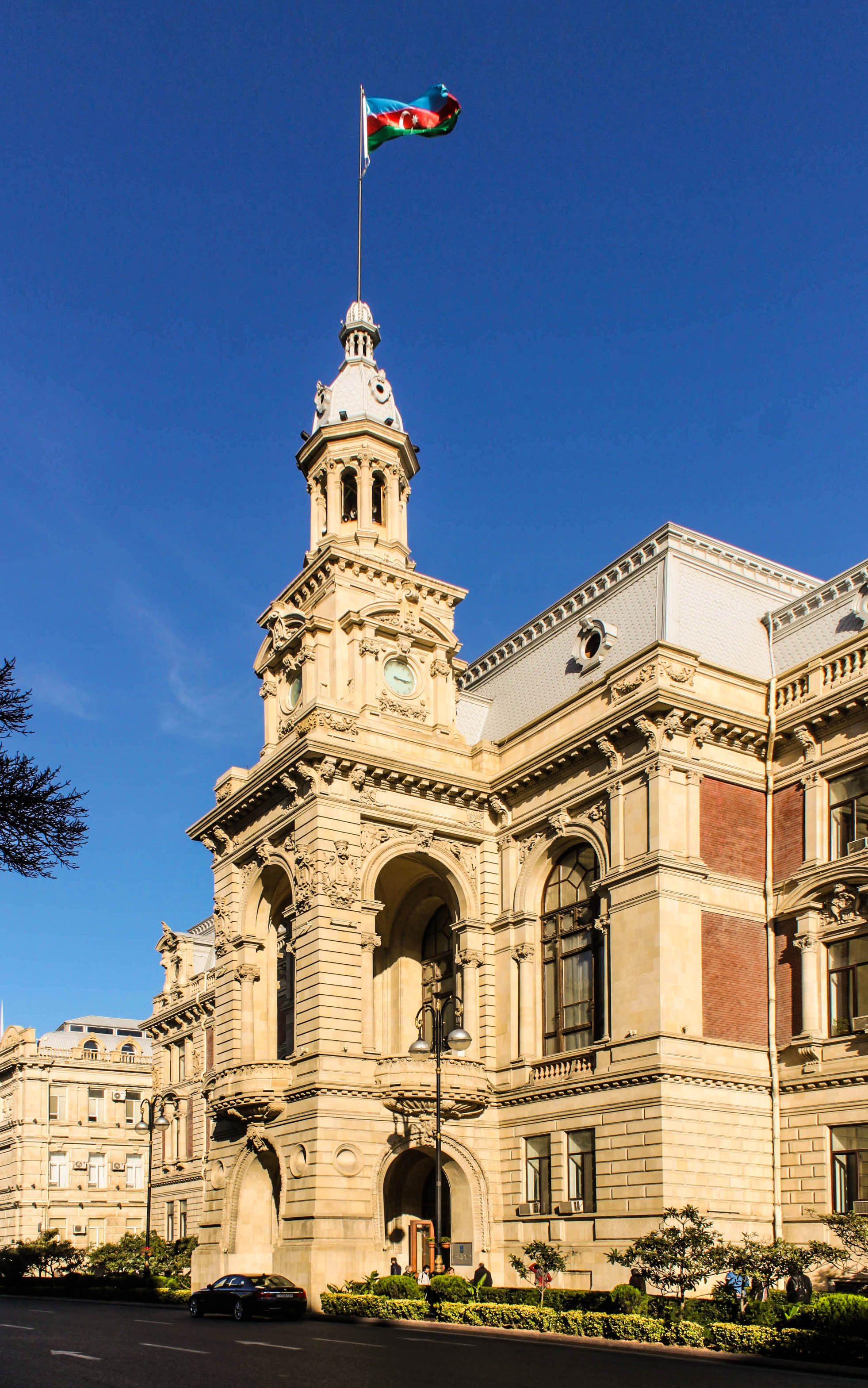 Bakı şəhər İcra Hakimiyyəti binasının qülləsi